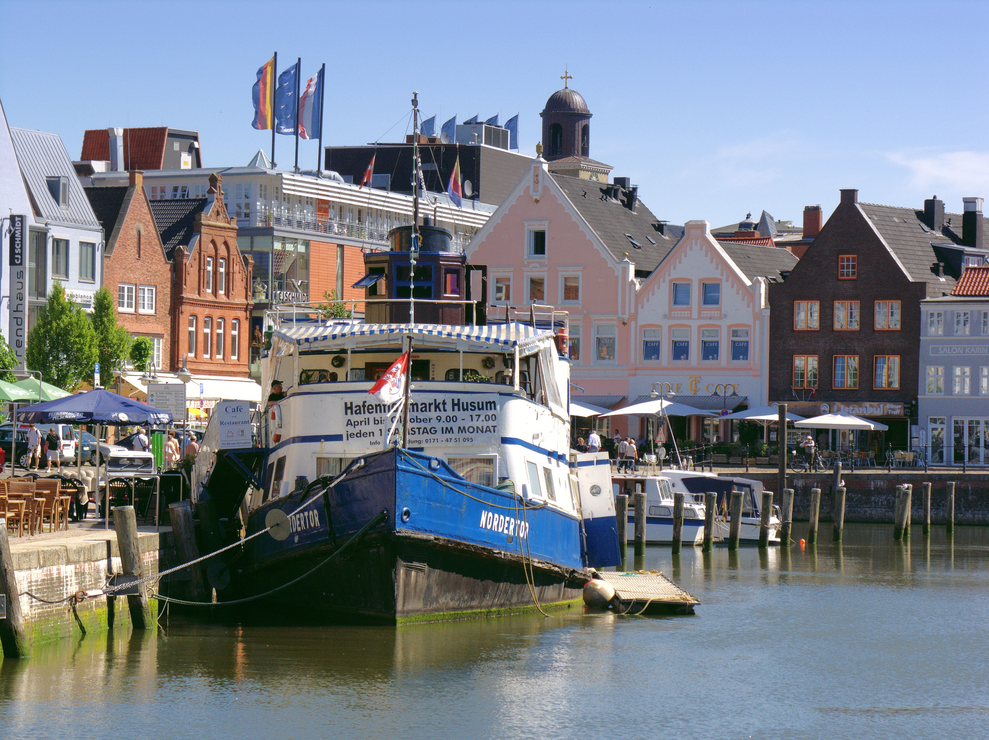 Am Hafen